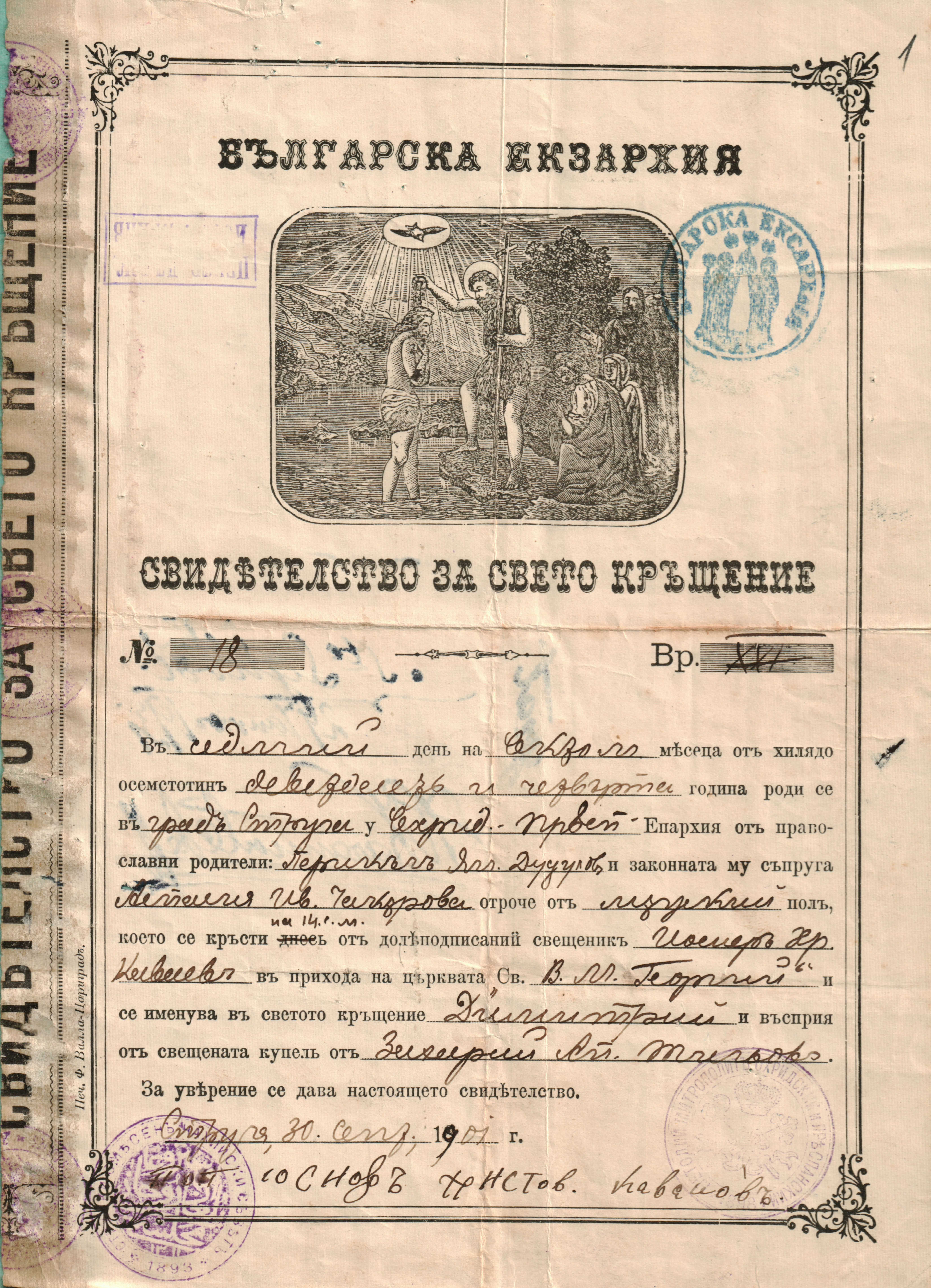 Кръщелно свидетелство на Димитър Дудулов, издадено от Охридската православна епархия.